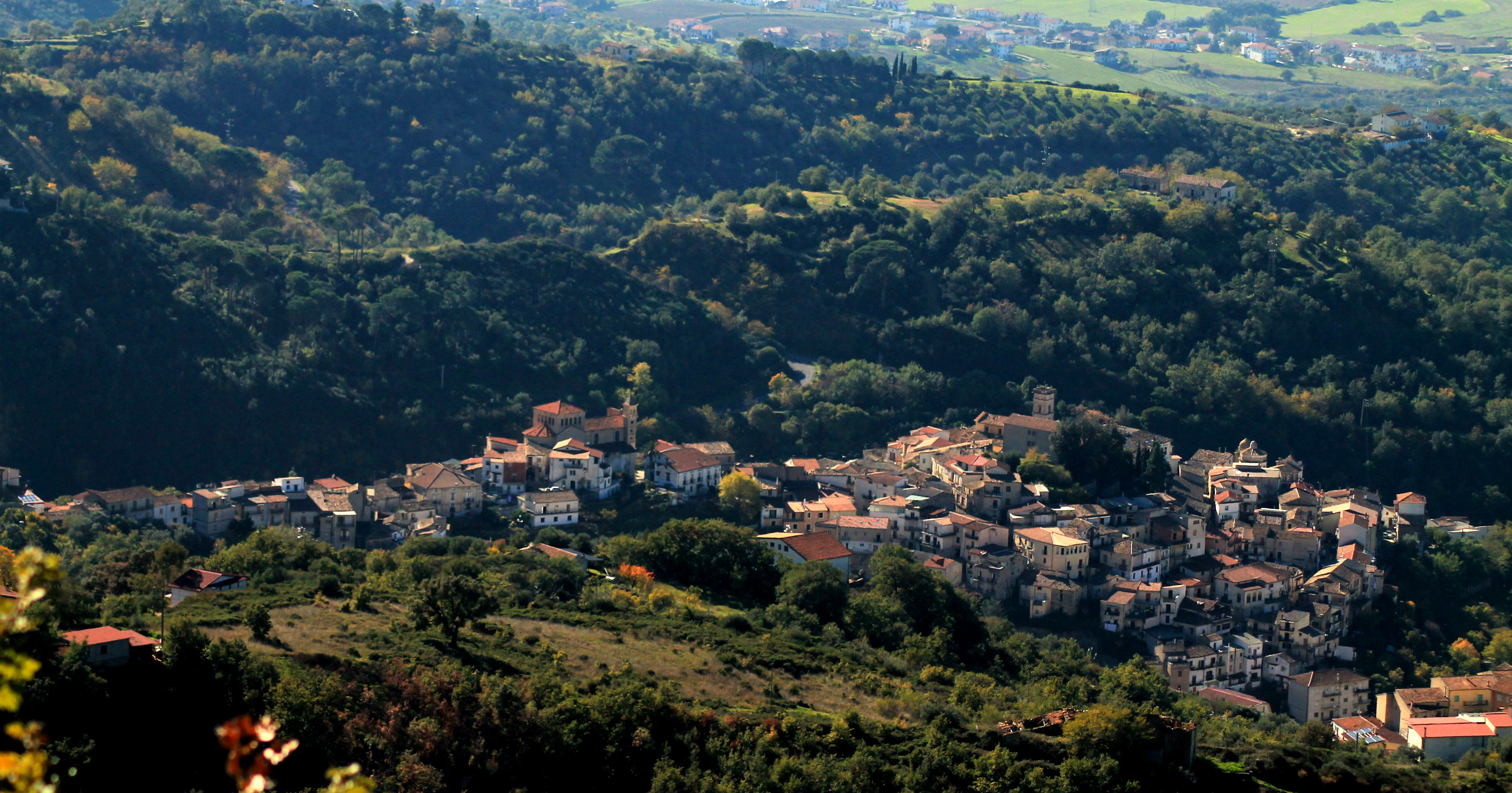 Luzzi